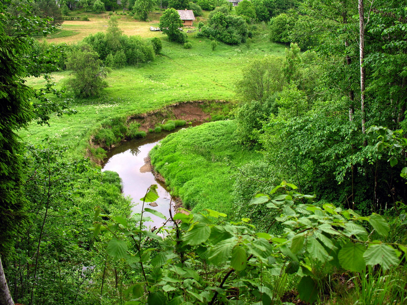 Riežupė